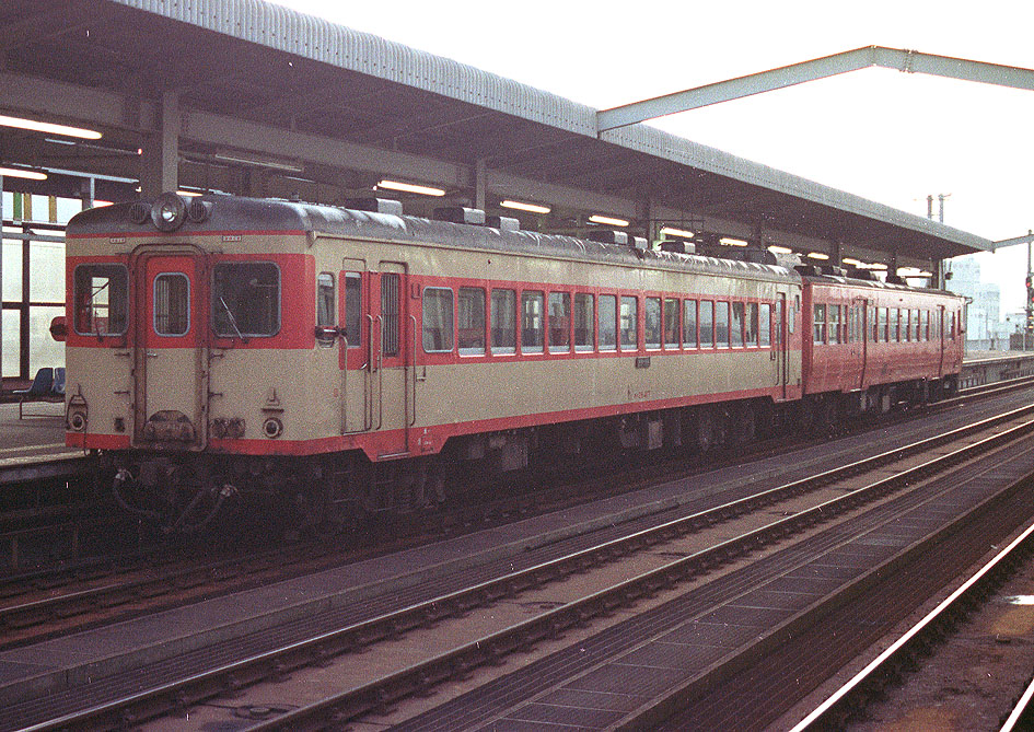 国鉄キハ26 417